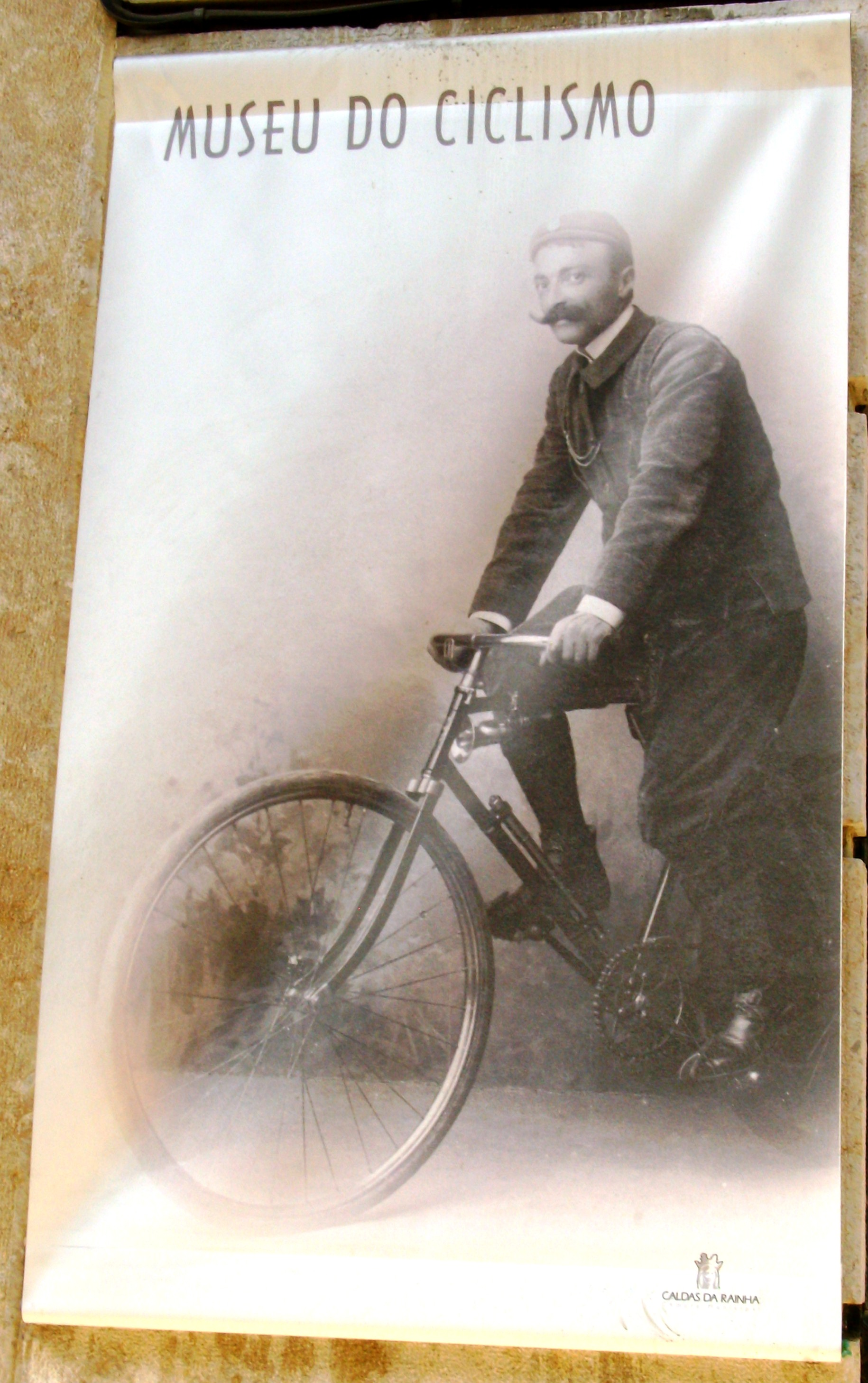 Museu do Ciclismo, Caldas da Rainha, Portugal: cartaz institucional.